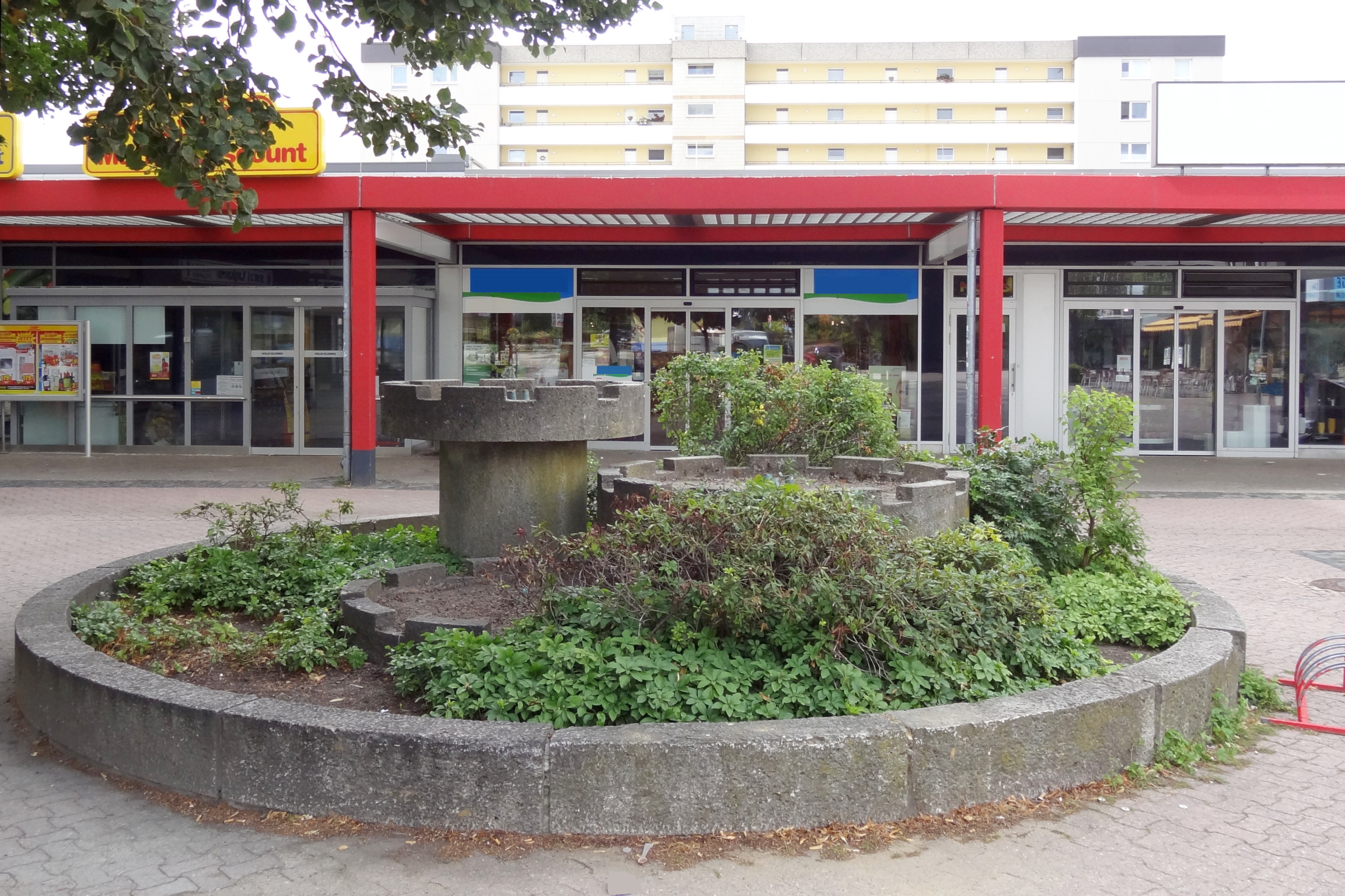 Brunnen auf dem Erfurtplatz in Braunschweig-Heidberg